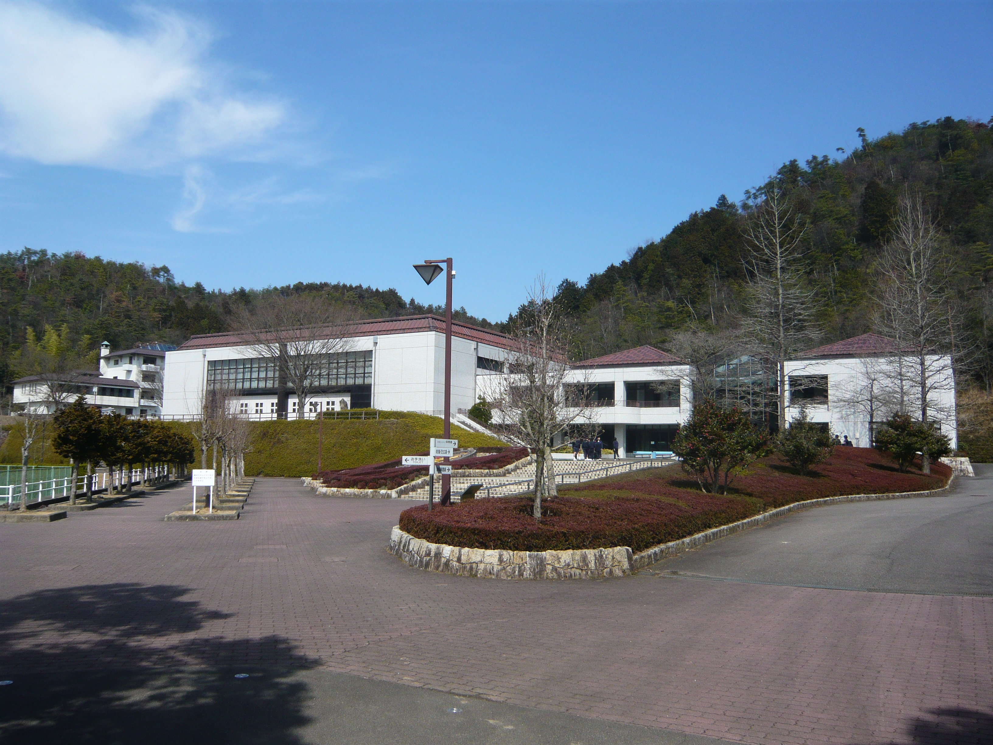 Gifu Family Park 体育館（岐阜ファミリーパーク）,Gifu,Gifu,Japan（岐阜県岐阜市）で撮影。